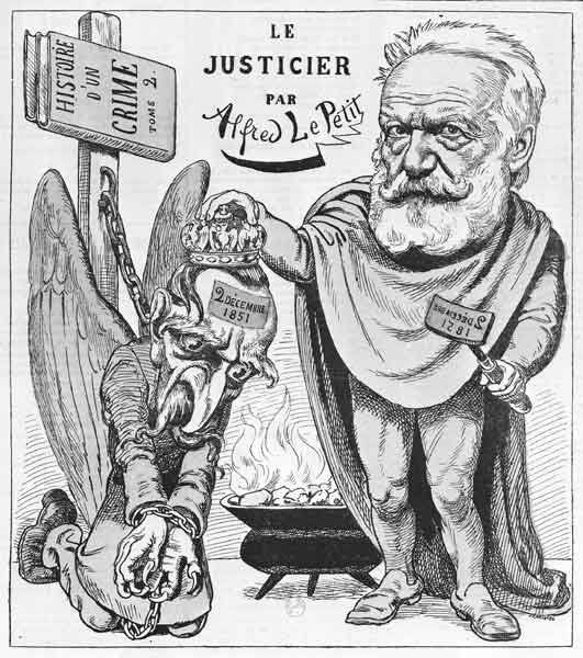 Caricature de Victor Hugo par Alfred Lepetit.